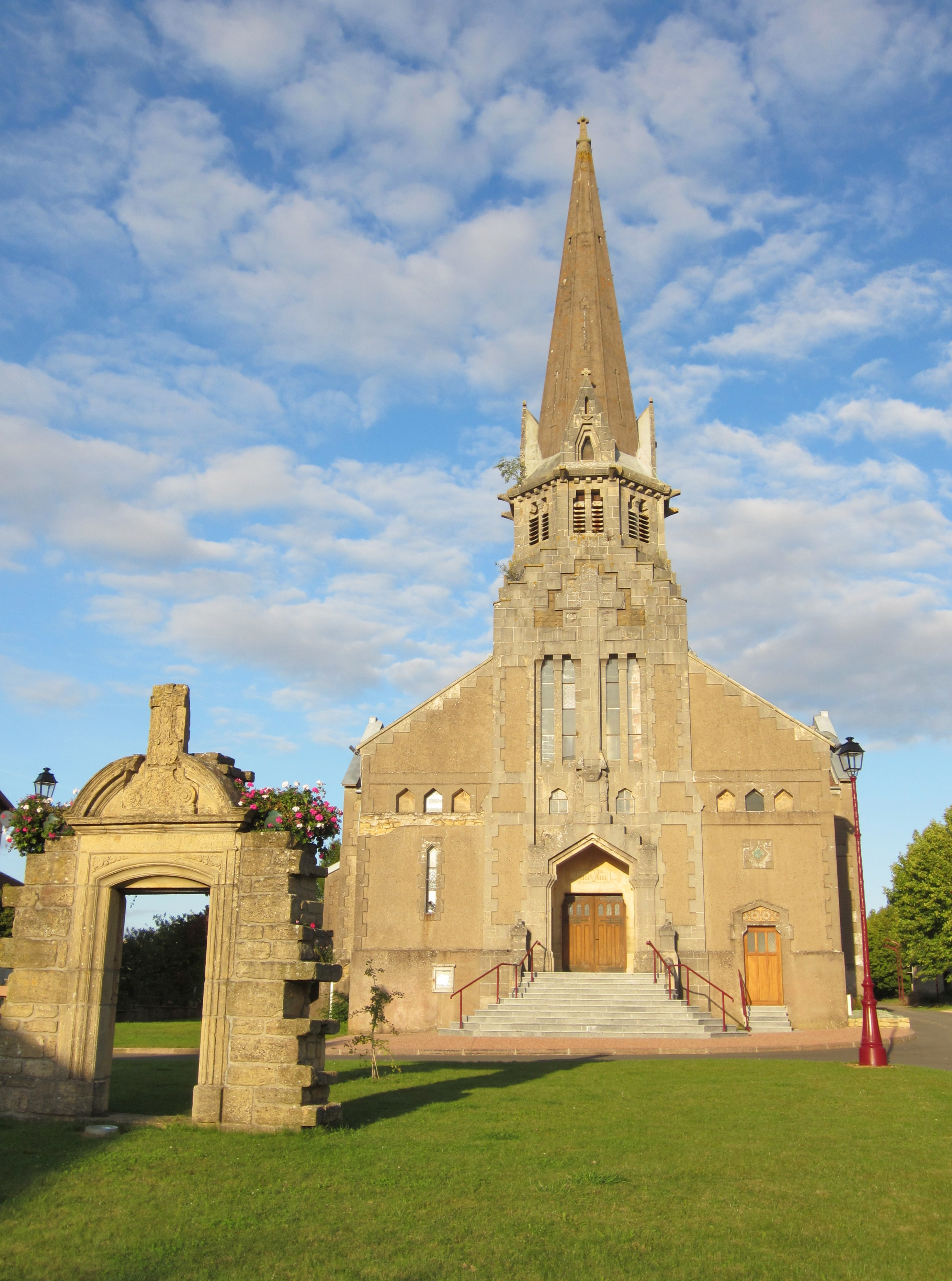 Description église Piennes église Piennes